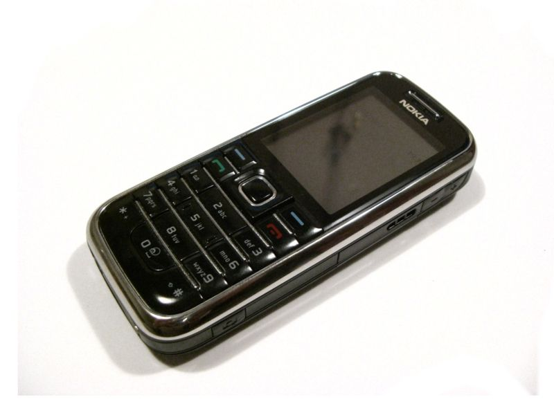 Nokia 6233